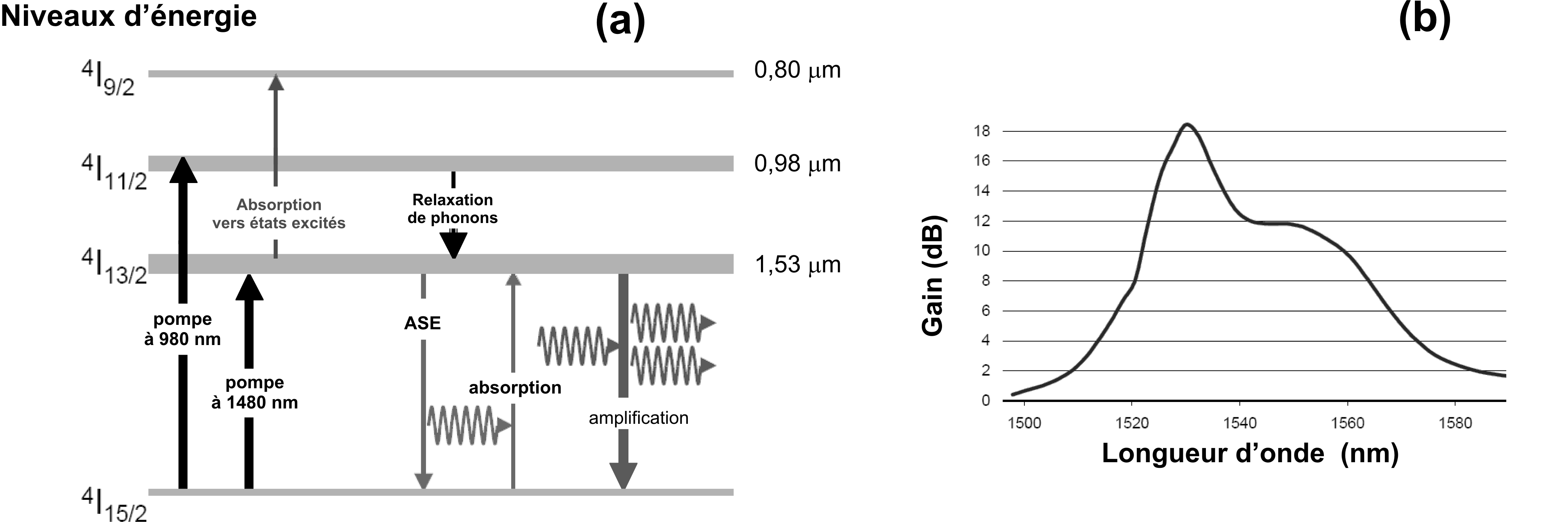 Principe de l'amplification erbium. Niveaux énergétiques et exemple de courbe de gain caractéristique aux longueurs d'ondes des télécommunications optiques